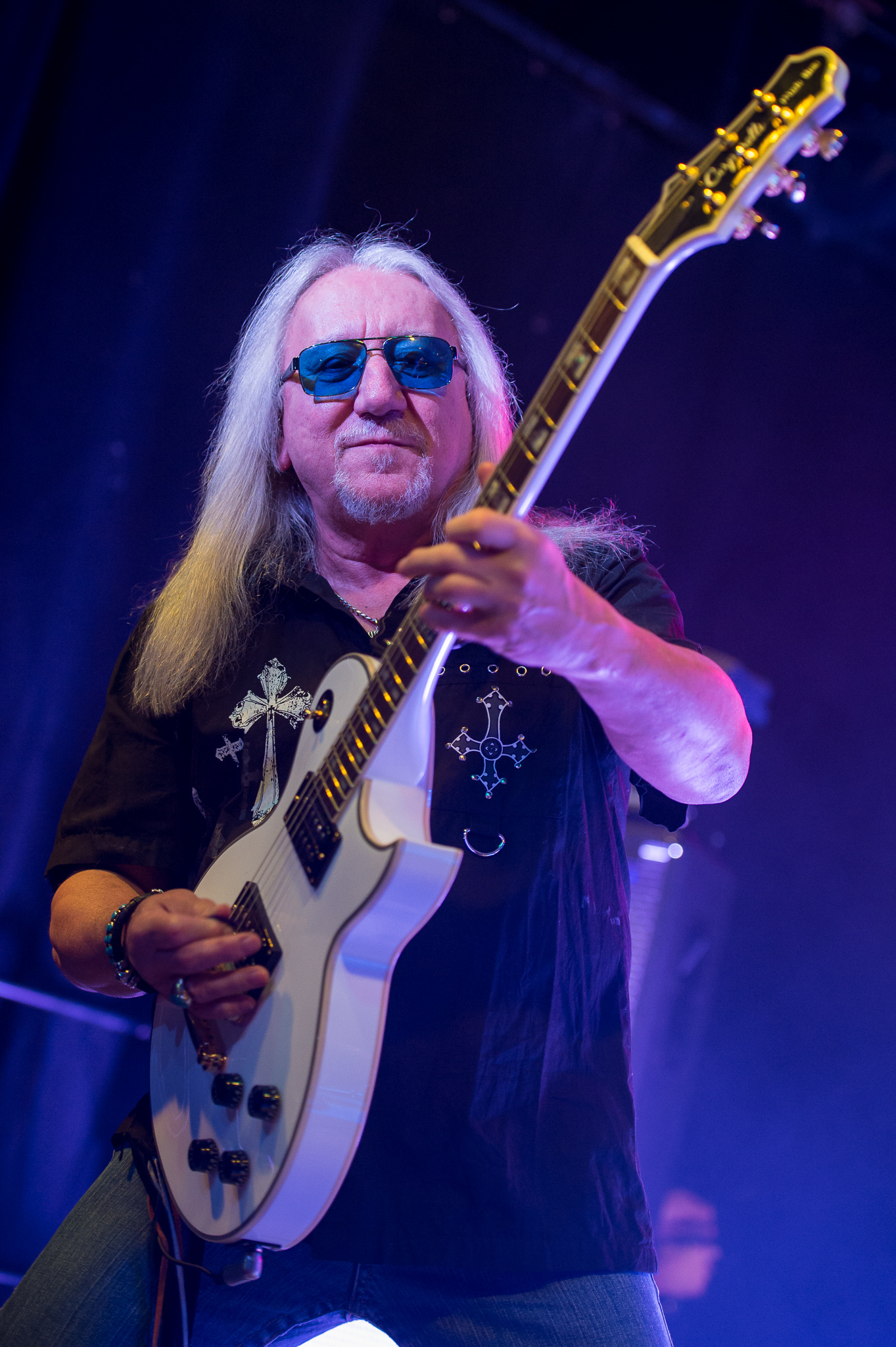 Concertbüro Franken,Der Hirsch,Konzert,Livekonzert,Livemusik,Mick Box,Musik,Uriah Heep